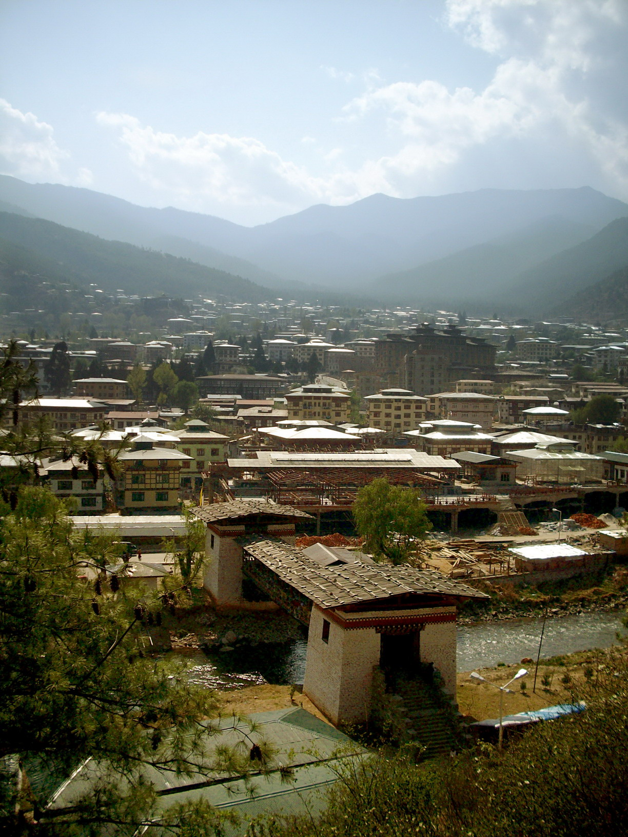 Thimphu, Bhutan